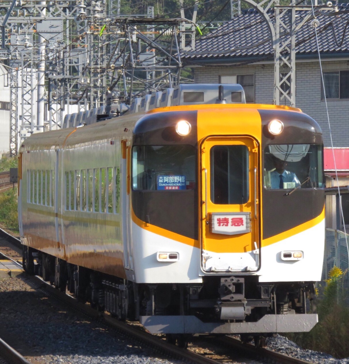 近鉄南大阪線16000系 特急大阪阿部野橋行き